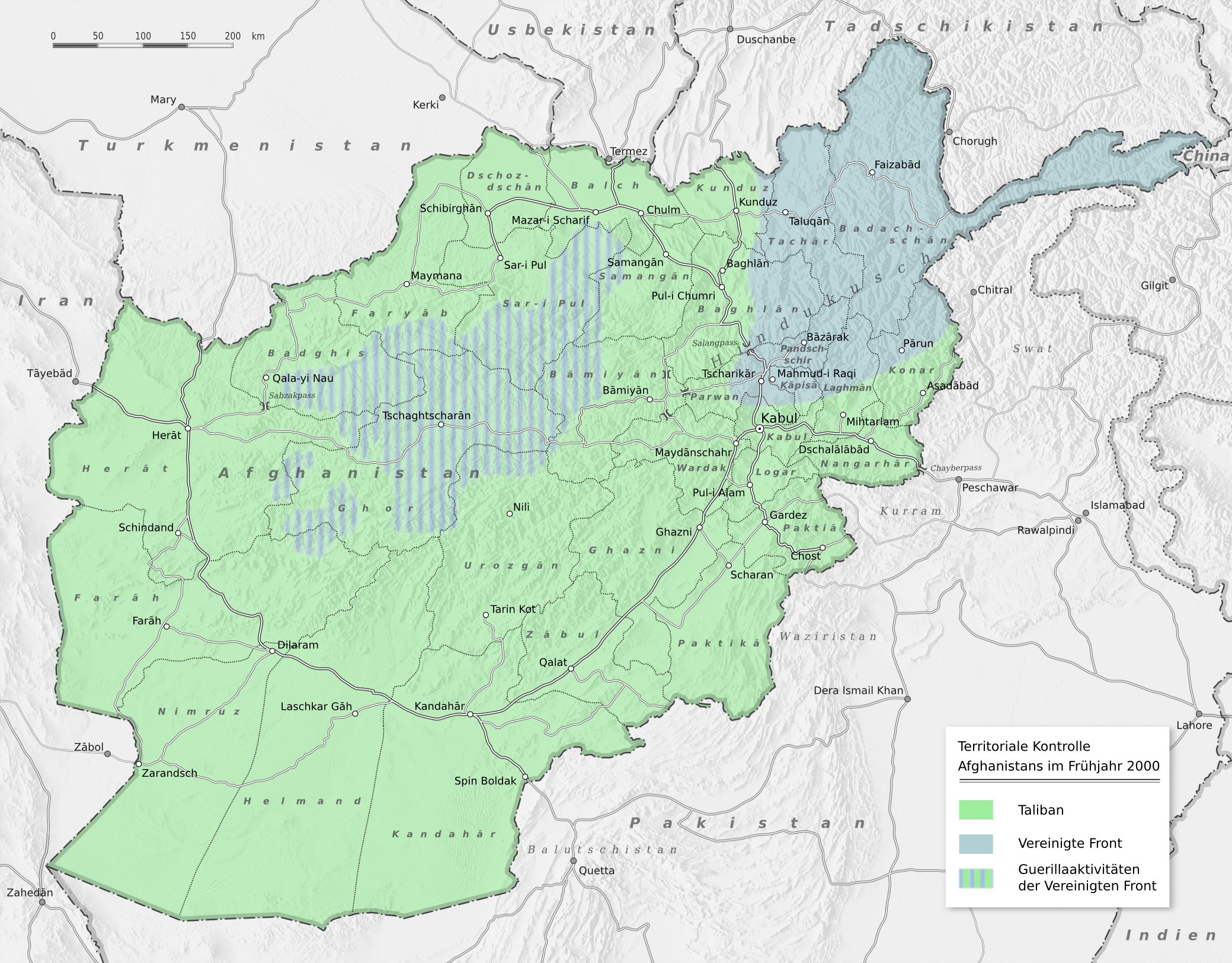 Vereinfachte Darstellung der territorialen Kontrolle Afghanistans im Frühjahr 2000